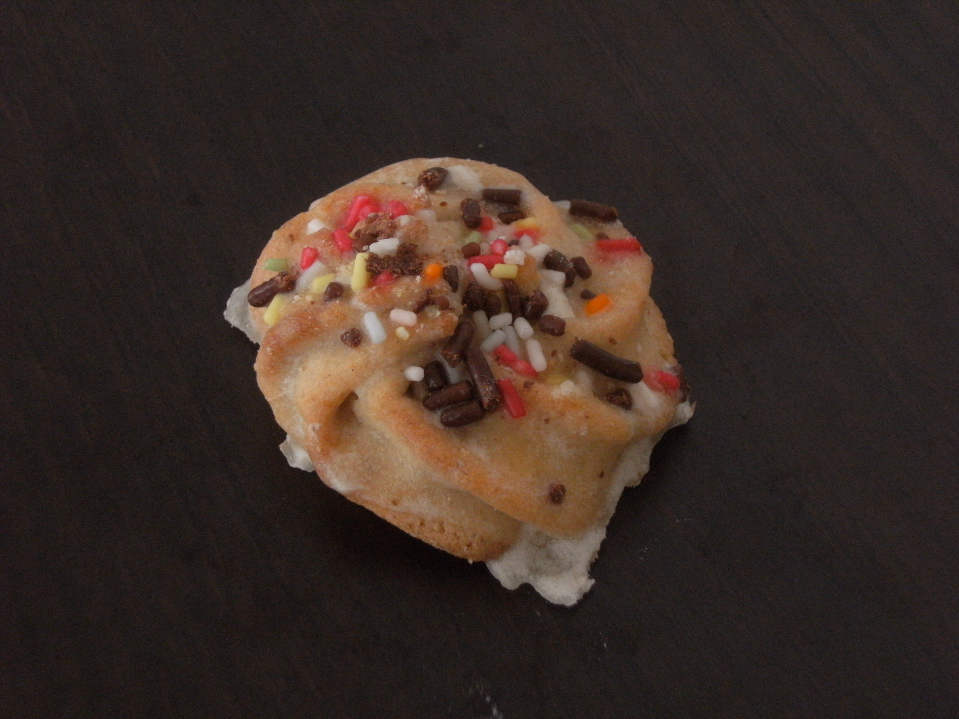 Weihnachtsplätzchen 2008.